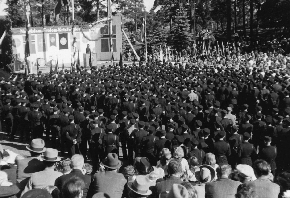 Datering: 1942/07 (feilaktig - Foto fra NS' Borgarting i Sarpsborg 20. juni-21. juni 1942 - se under) RA/RAFA-3309/U 41A/3 /41-3-54 img306